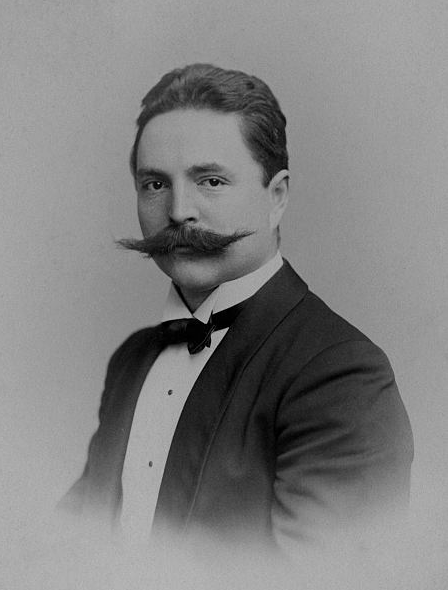 Foto des deutschen Bildhauers Johannes Goetz von Wilhelm Fechner, c. 1900